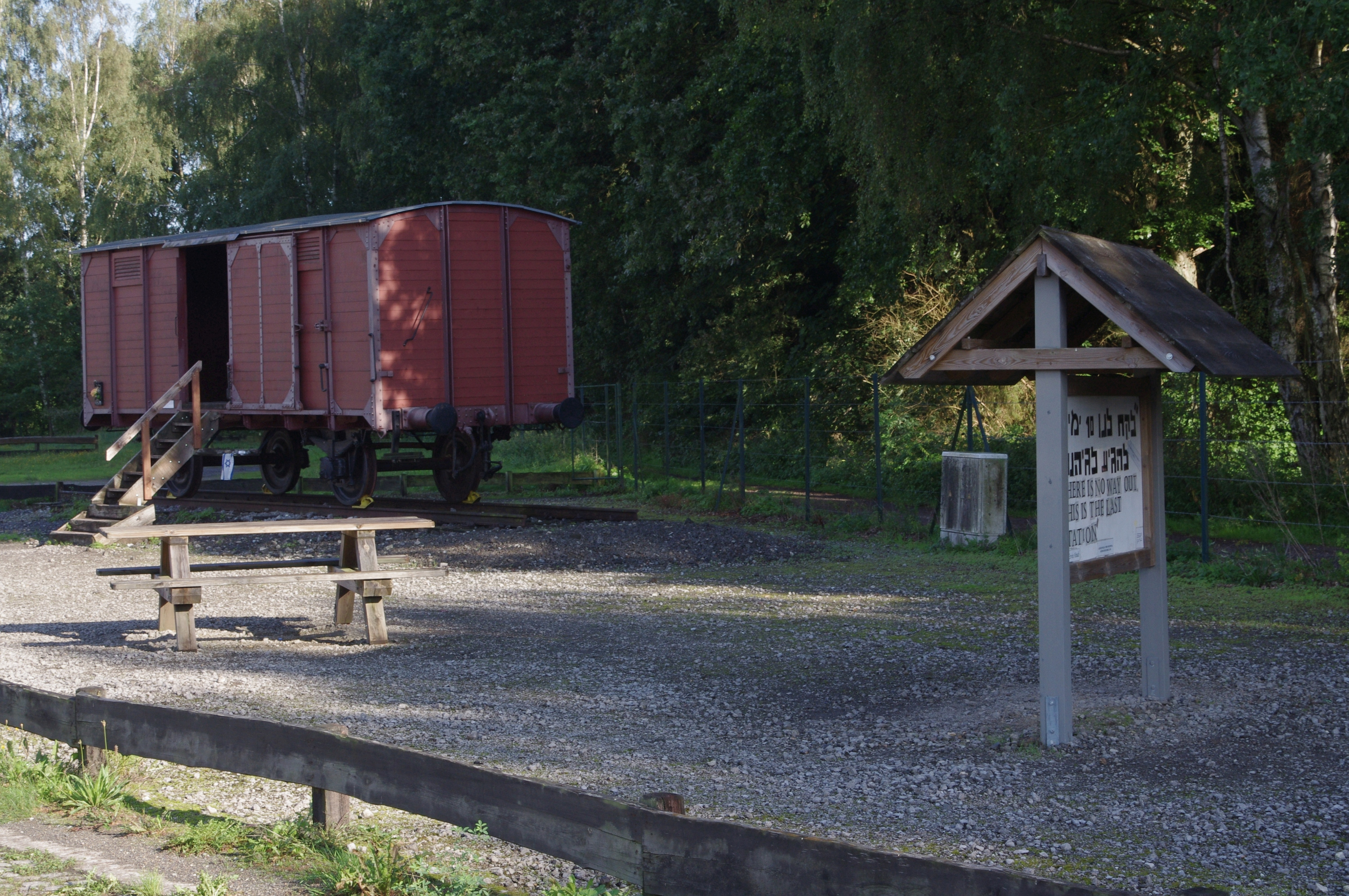 Laderampe Bergen-Belsen. Schaukasten und Waggon